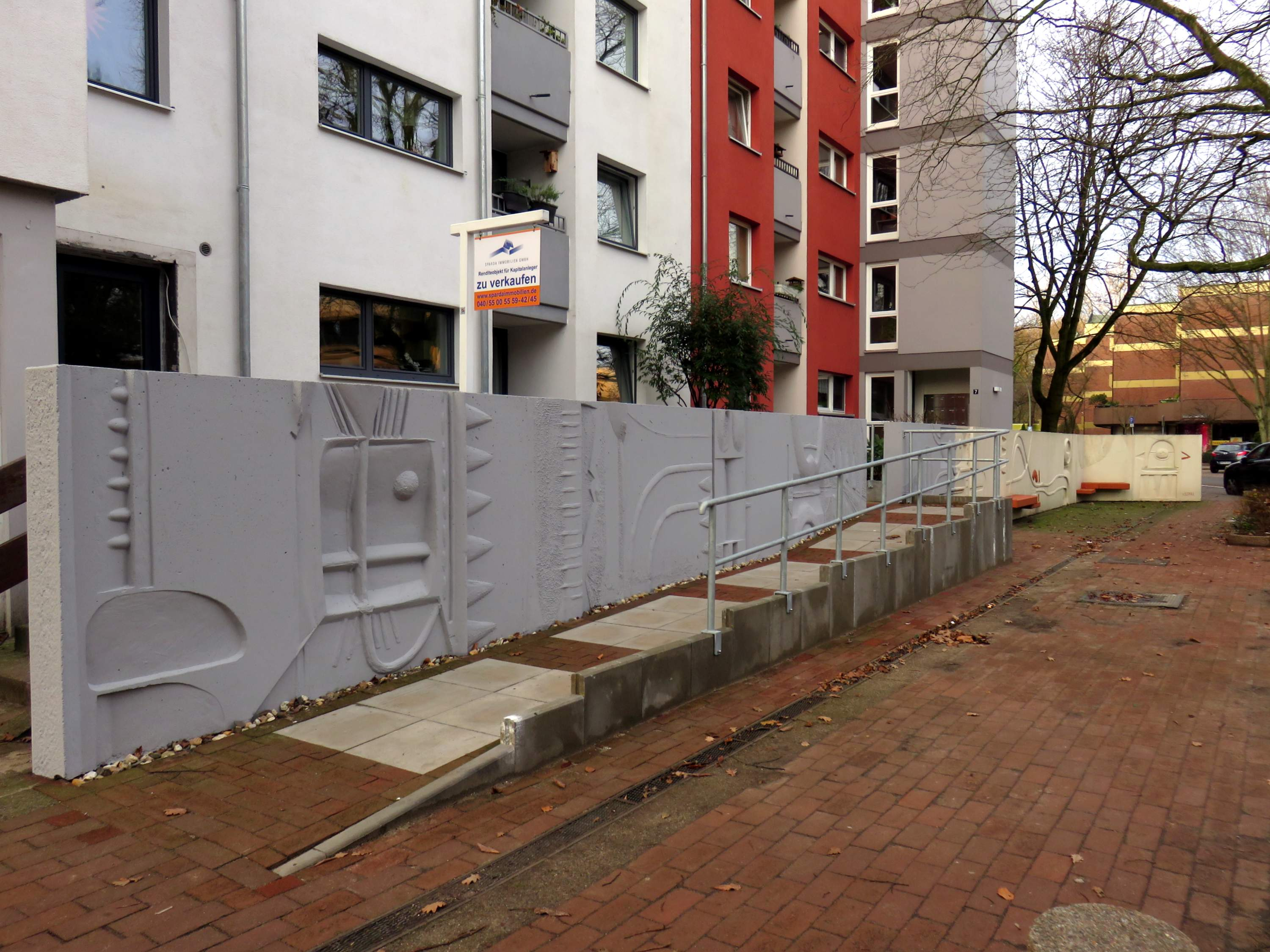 Stein-Reliefwand von Veronika Schlüter-Stoll von 1973 vor Hauseingang Groten Hoff 5 (ff) in Hamburg-Volksdorf.